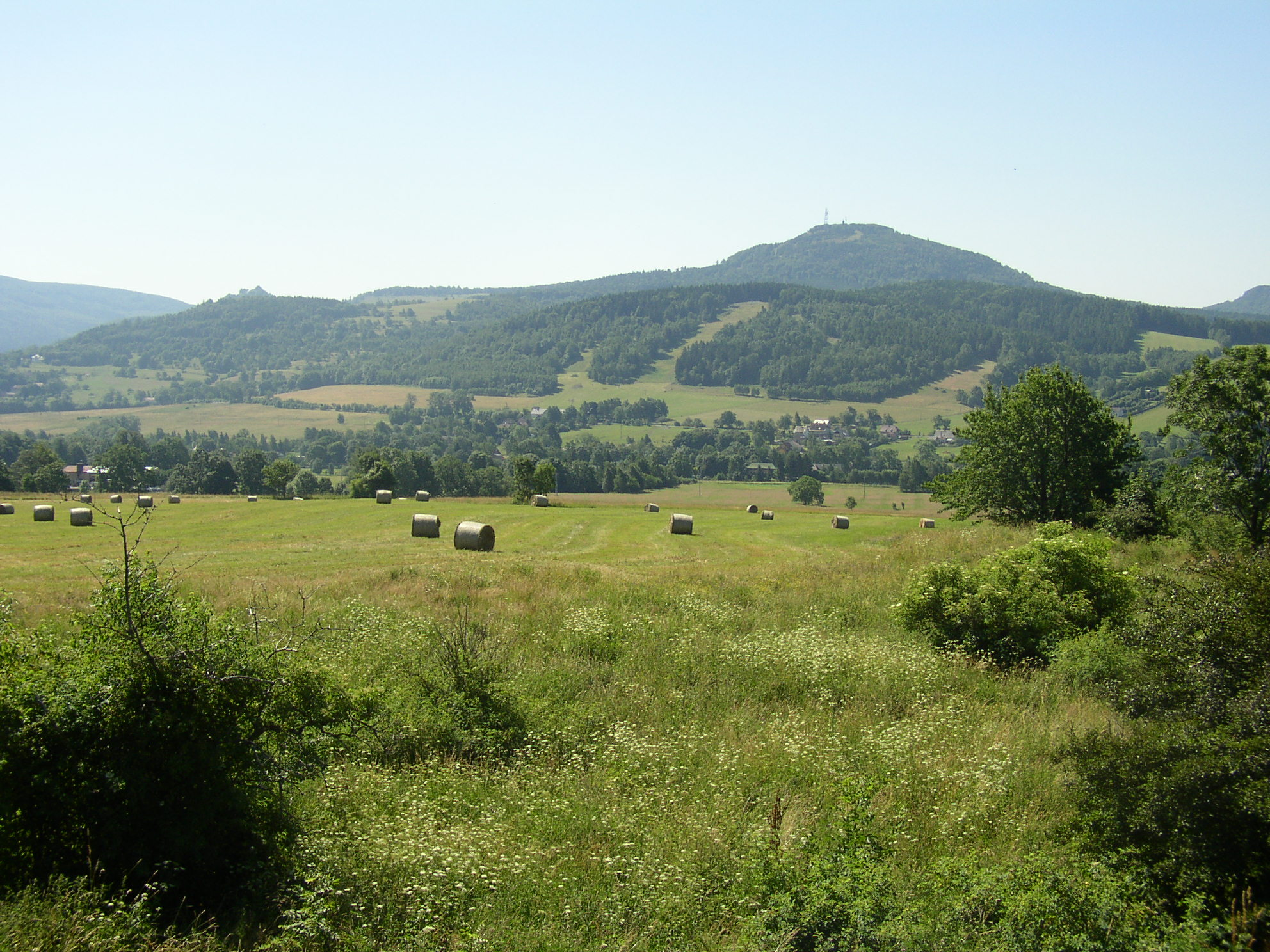 Česky: Výhled ze Světlického vrchu (Petružálkovy skalky). Vlevo Tolštejn, v popředí Šibeniční vrch se sjezdovkami, vpravo Jedlová.